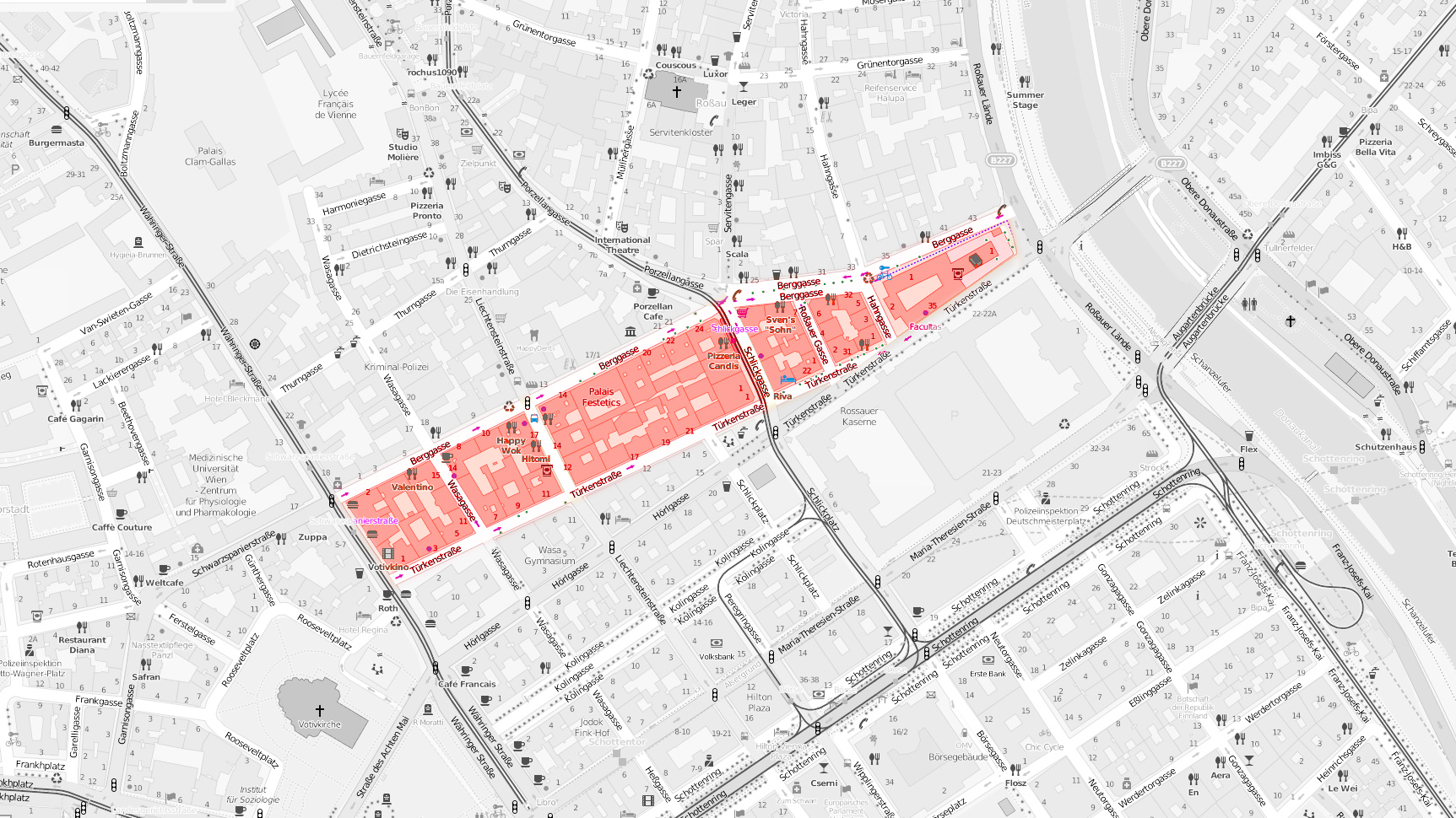 Plan des Stadterweiterungsgebiets „Neu-Wien“, angelegt 1853, Grafik von user:Gugerell, Basiskarte: Open Street Map This map may be incomplete, and may contain errors. Don't rely solely on it for navigation.